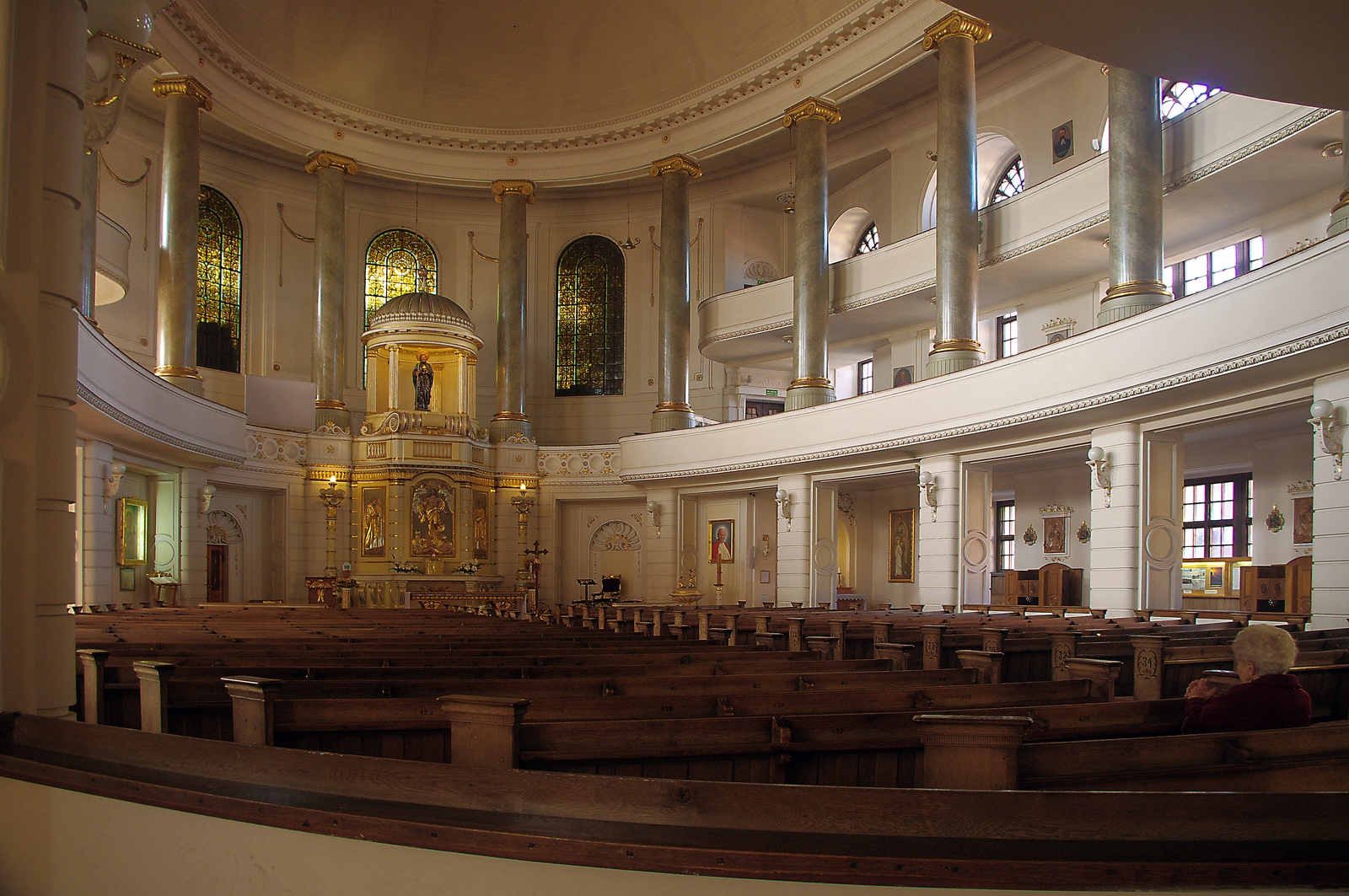 Rawicz, ul. Buszy - dawny kościół ewangelicki, obecnie rzymskokatolicki pw. św. Andrzeja Boboli z 1808, 1915 r. Wnętrze kościoła wybudowano na rzucie wpisanego w prostokąt owalu, wy­znaczonego przez 16 wysokich kolumn z głowi­cami w stylu jońskim. Są tam także dwa piętra balkonów. (zabytek nr 375/Wlkp/A)